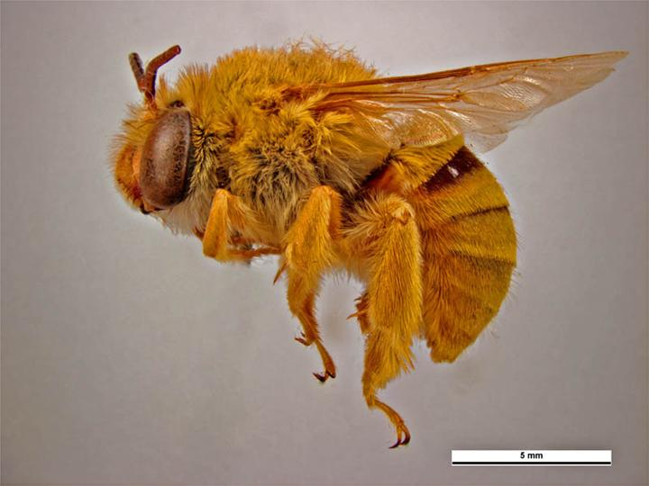 Amegilla (Asaropoda) bombiformis Lateral view - female